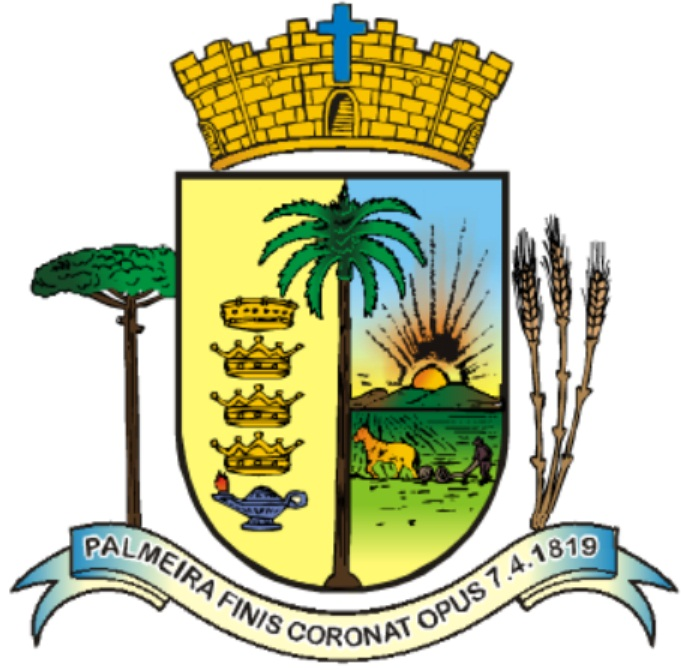 Pela sua tradição histórica, Palmeira não pode deixar de possuir o seu escudo, escolhendo assim o escudo português por ser o mais adaptado aos brasões de cidades e atendendo a formação racial dos fundadores de Palmeira. Como elementos do escudo vemos a palmeira (centro), símbolo toponimio, constituindo a figura parlante do nome do municipio. Uma coroa de Barão e três de Visconde, representando a nobreza que se originou em Palmeira e que foi lar das mais respeitaveis famílias. Uma lampada acesa relembrando a frase do Barão de Tibagi "quero deixar uma luz para minha família". O campo a esquerda representa a atividade do povo de Palmeira, que é rural, o sol que nasce entre as elevaçoes suaves caracteriza as areas de plantações e a esperança que temos no futuro de nossa agricultura. A cruz situada na torre central relembra a formação religiosa do povo, que desde os primórdios demonstrou índole puramente cristã. Os dois suportes representam o pinheiro base da economia e o trigo como símbolo da lavoura... Por fim em heráldica inscrições em latim FINIS CORONAT OPUS - "O fim coroa a obra" e de ambos os lados o nome do município e a data de sua fundação 07.04.1819 PALMEIRA FINIS CORONAT OPUS 7.4.1819